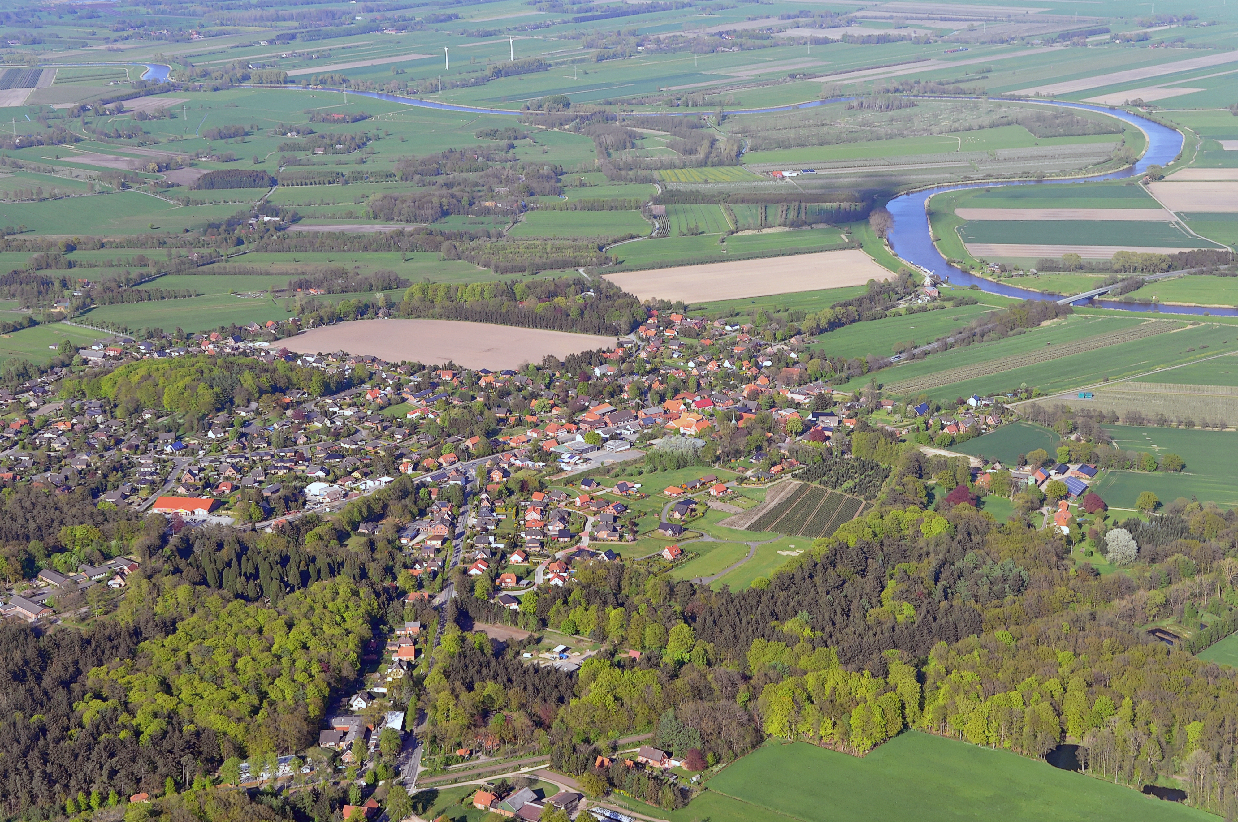 Luftbilder von der Nordseeküste 2012-05